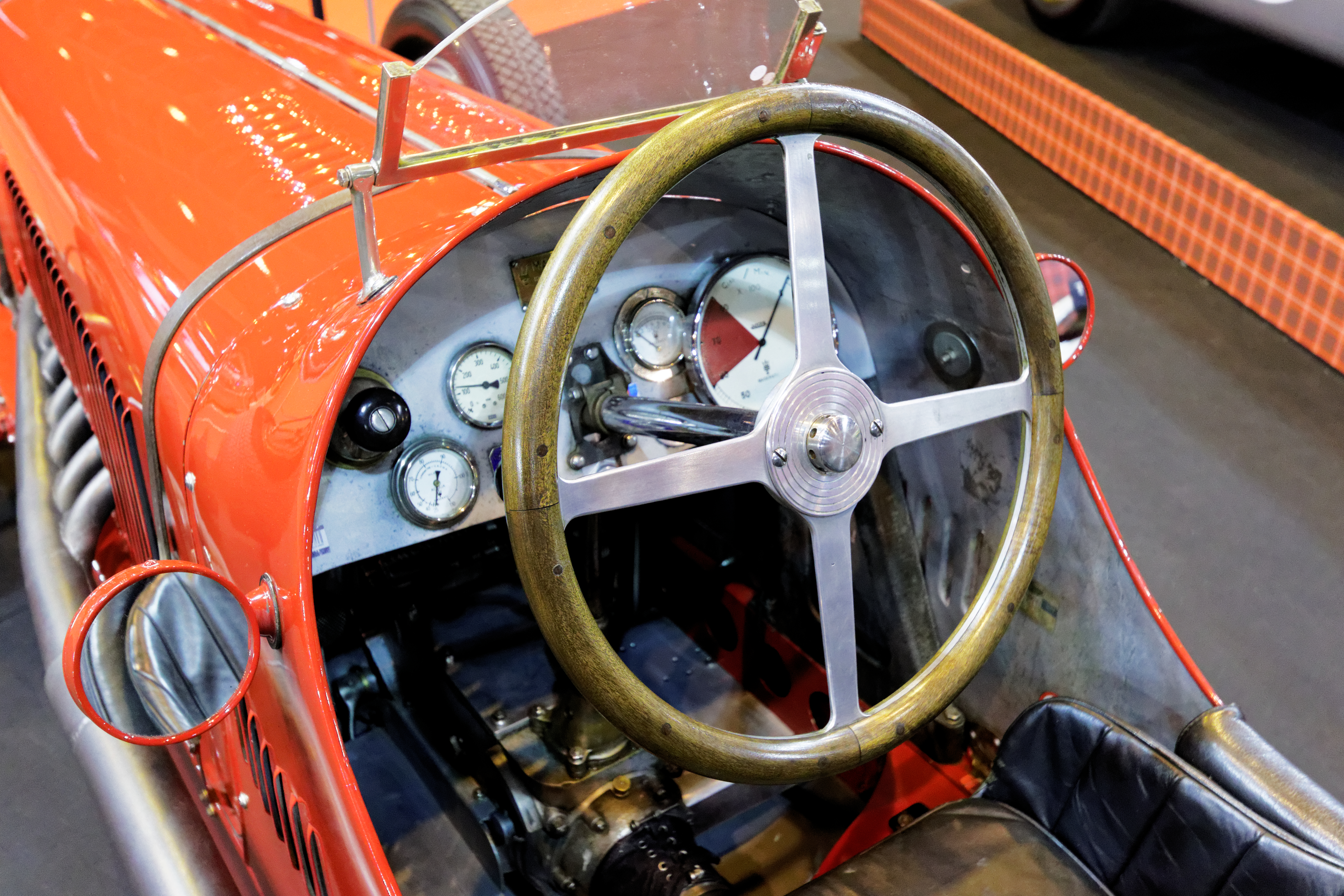 Une des voiture présentée lors du salon Rétromobile de Paris 2015